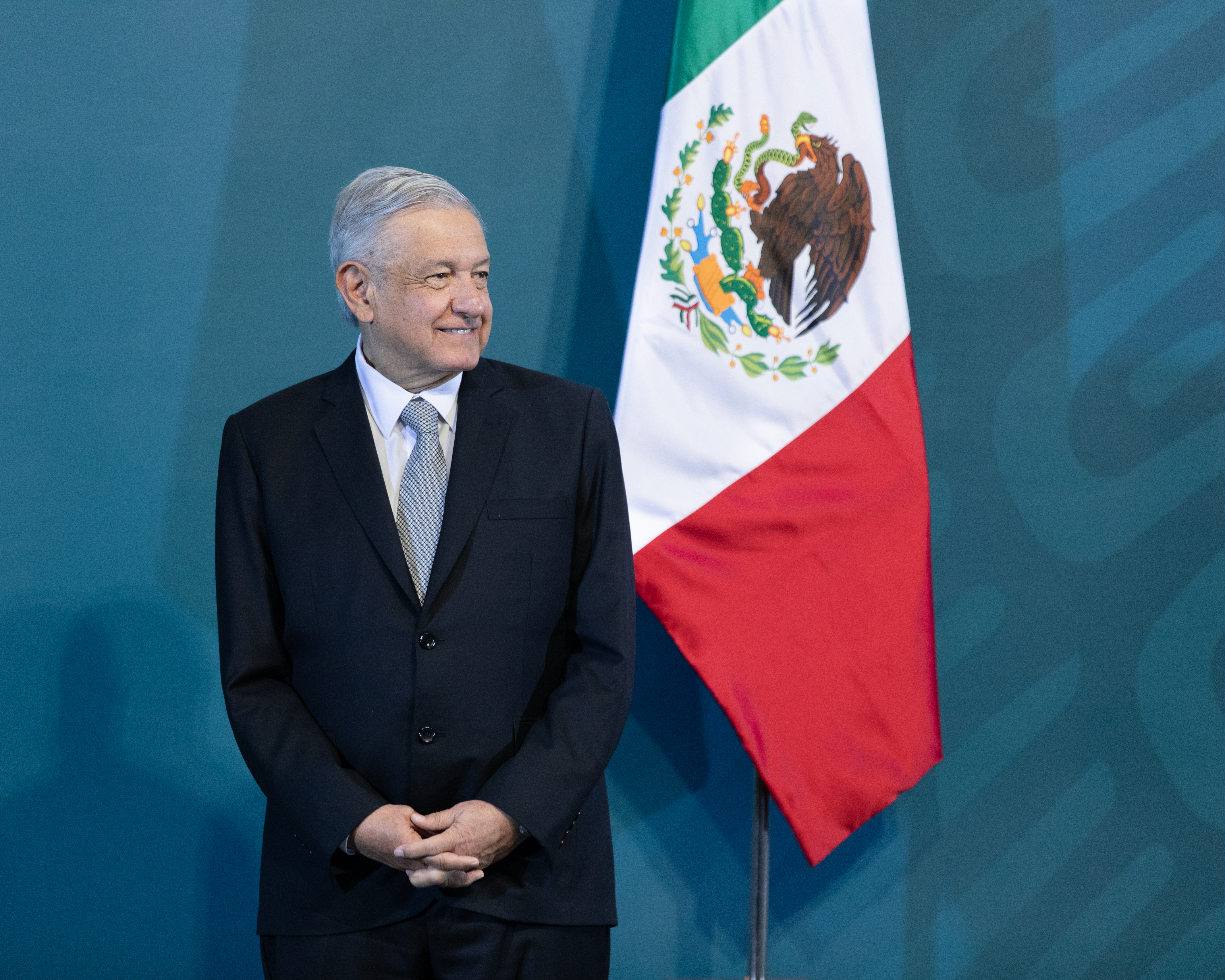 De lunes a viernes, Andrés Manuel López Obrador da una conferencia de prensa a las 7am